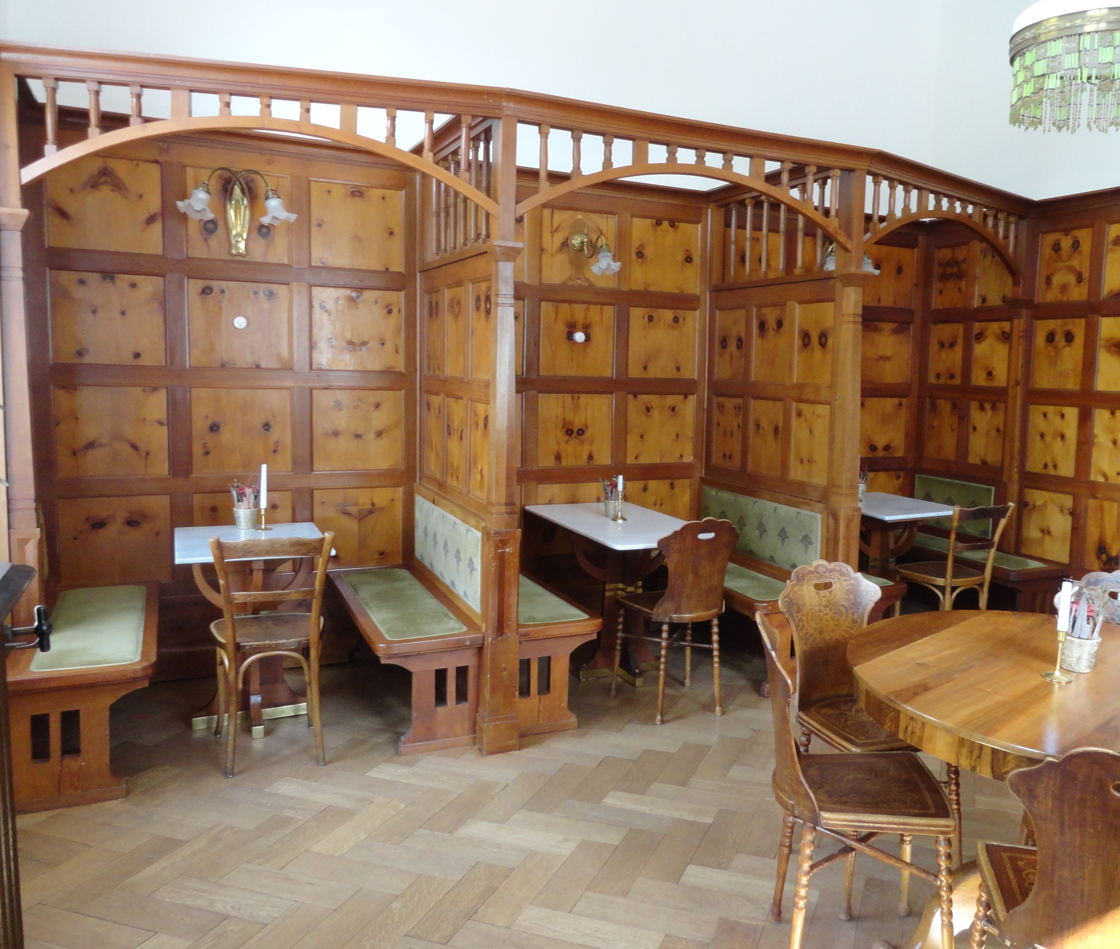 Kurhaus Bergün Bar